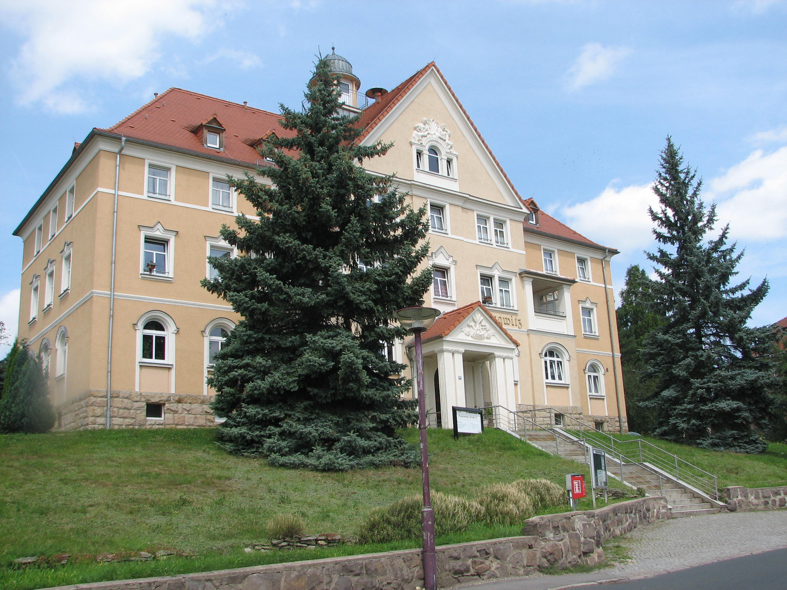 Ehemaliges Wurgwitzer Rathaus